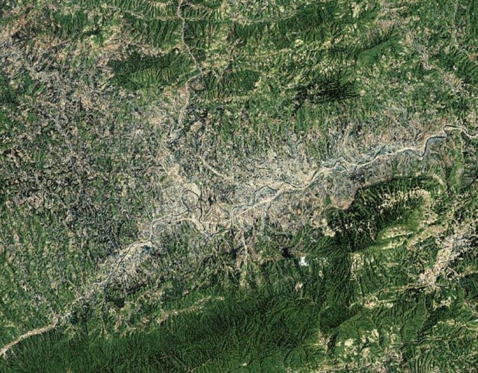 中国陕西汉中市宁强县卫星地形图